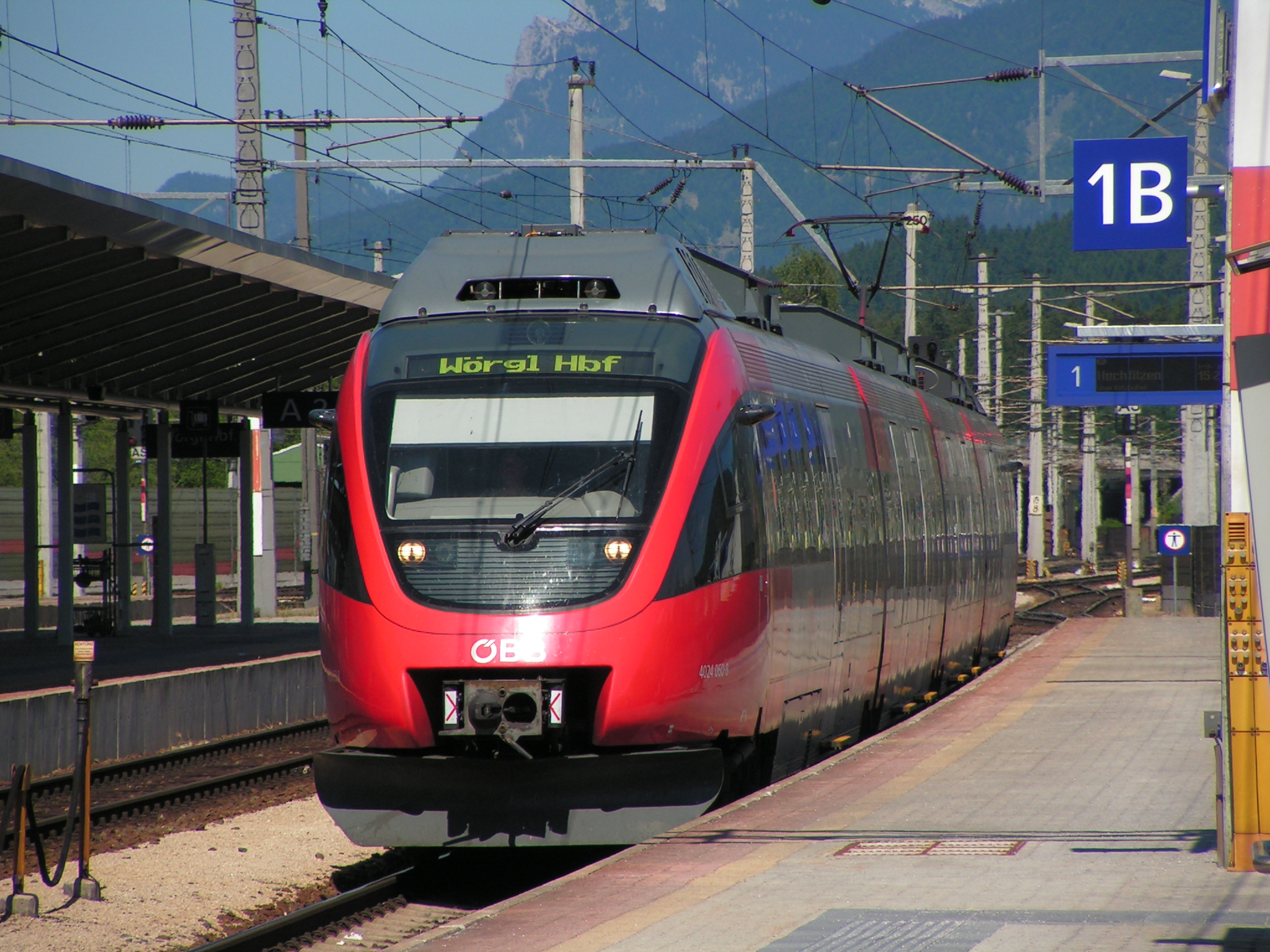 ÖBB 4024